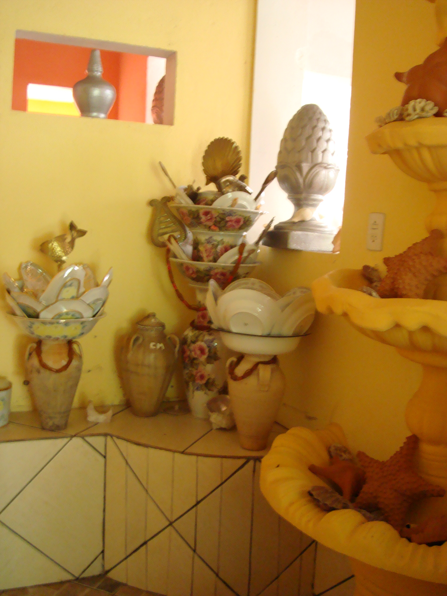 Assentamento do orixá Oxum, candomblé Orossi.